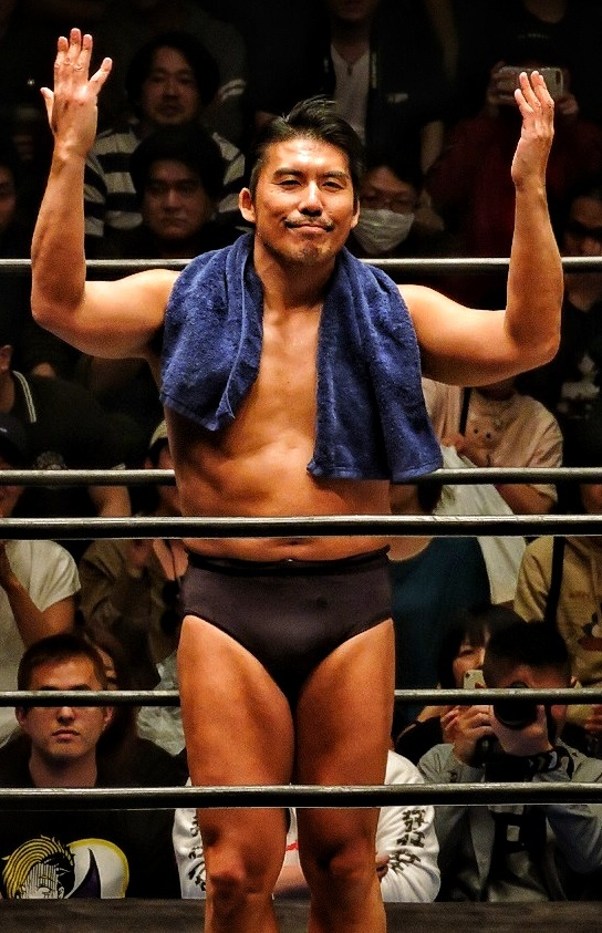 プロレスラーのGENTARO選手